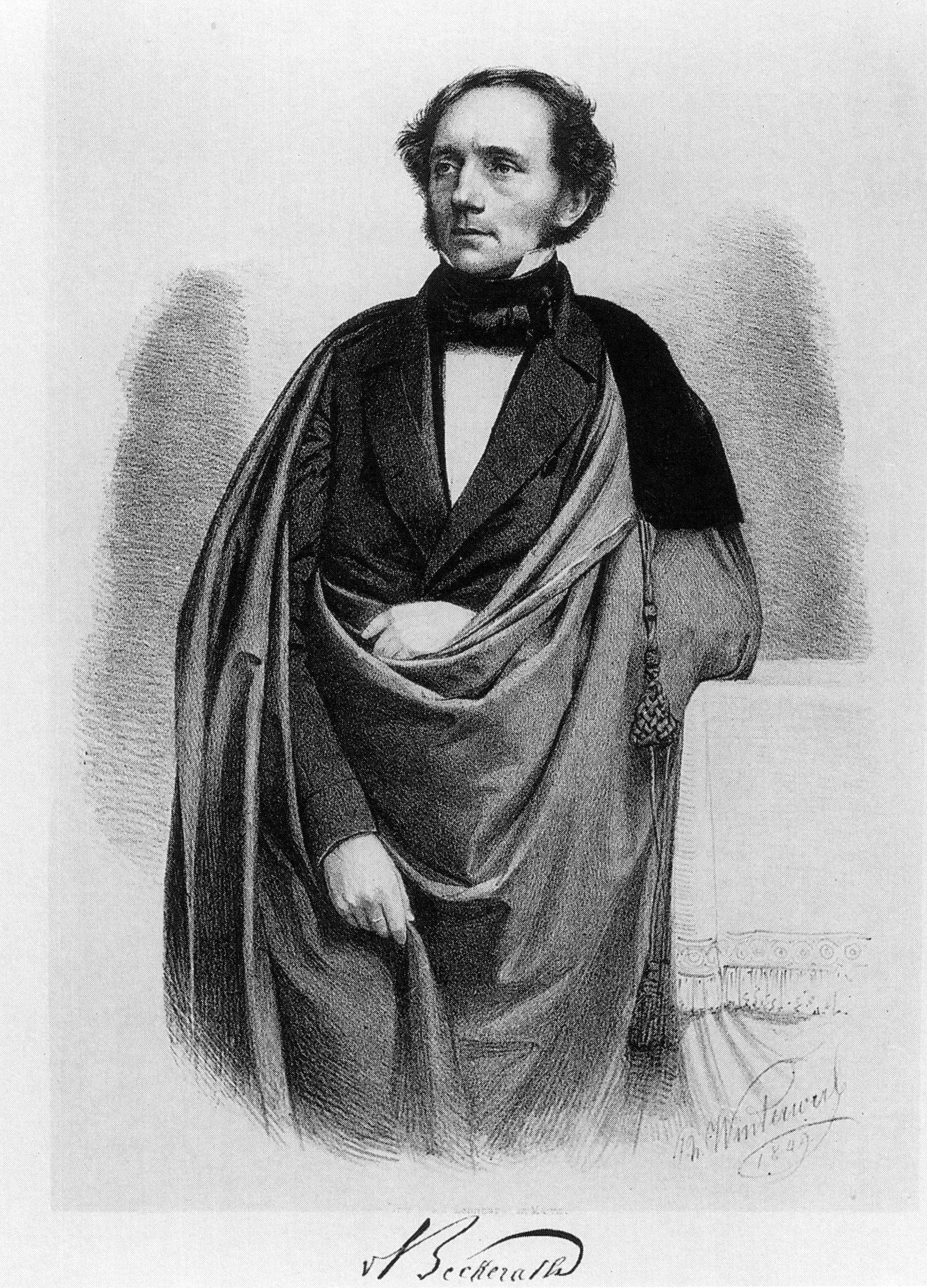 Lithographie, Philipp Winterwerb, 1848. Hermann von Beckerath, Abgeordneter der Frankfurter Nationalversammlung